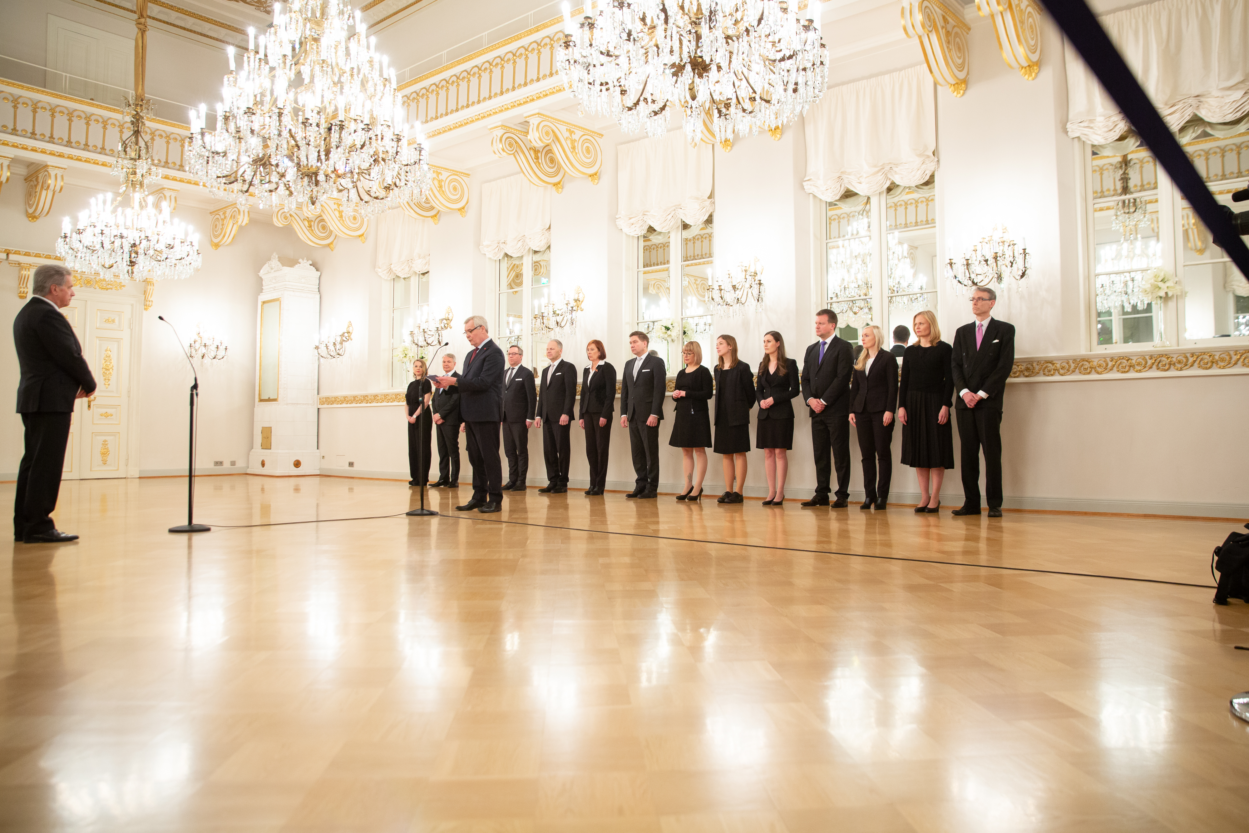 Rinteen hallitus jäähyväiskäynnillä Presidentinlinnassa. © Silja Aunola / valtioneuvoston kanslia